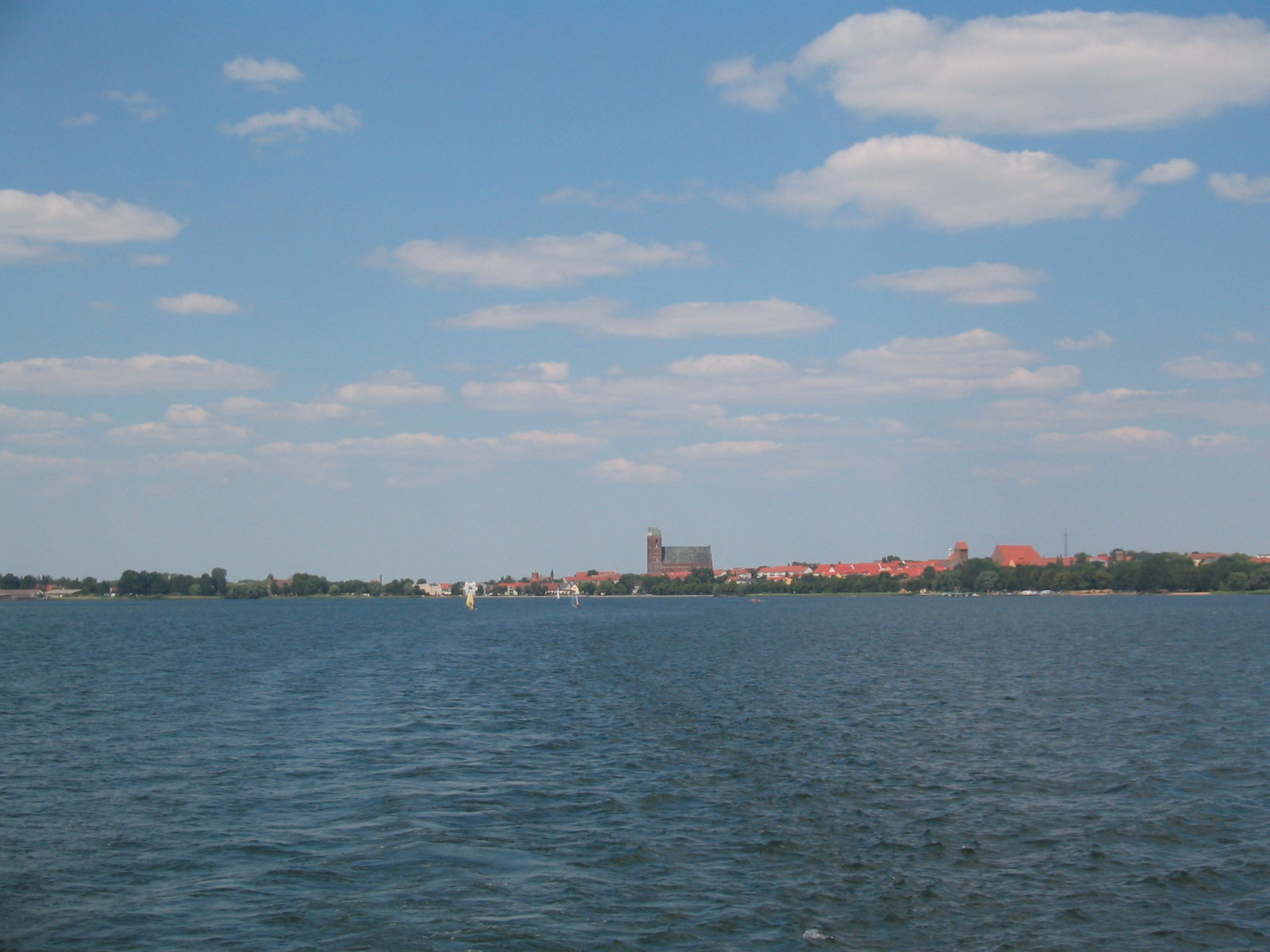 Unteruckersee mit Marienkirche in Prenzlau